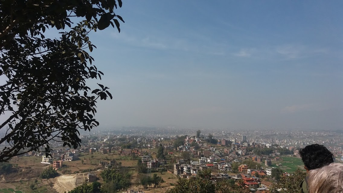 नेपाली: सुवर्णेश्वर महादेव, भक्तपुर